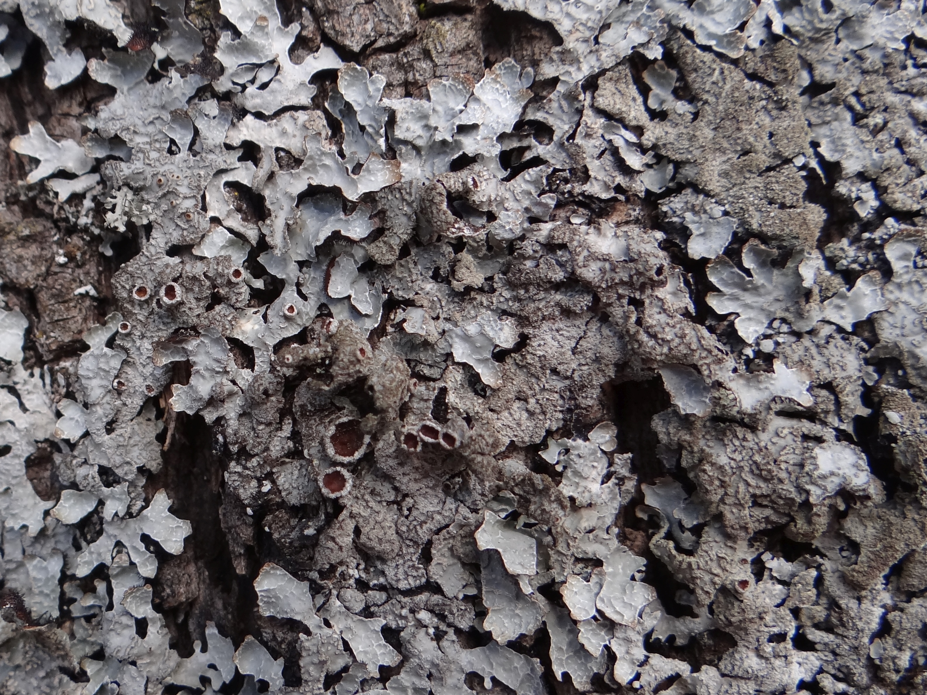 Parmelia sulcata. Location: Poland, Puszcza Białowieska